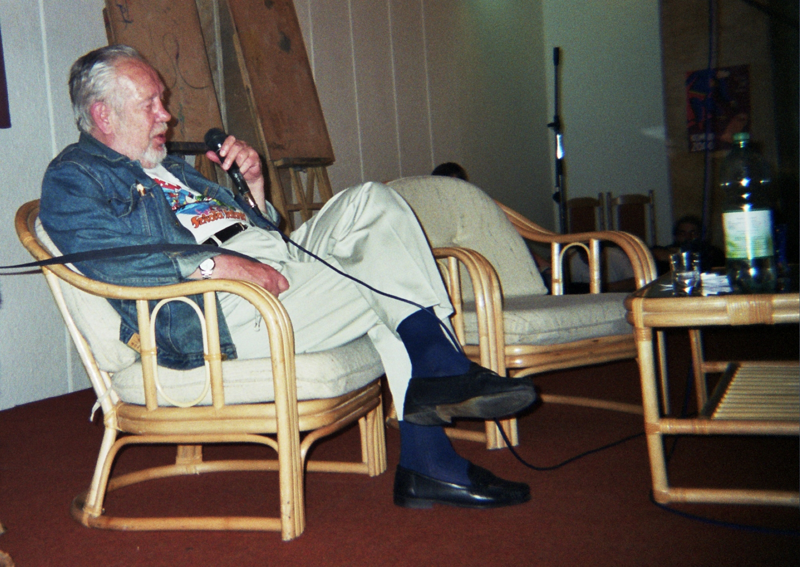 Janusz Christa na spotkaniu z czytelnikami podczas XI Międzynarodowego Festiwalu Komiksu w Łodzi (Łódzki Dom Kultury, 7 października 2000). Fot.: Arek1979